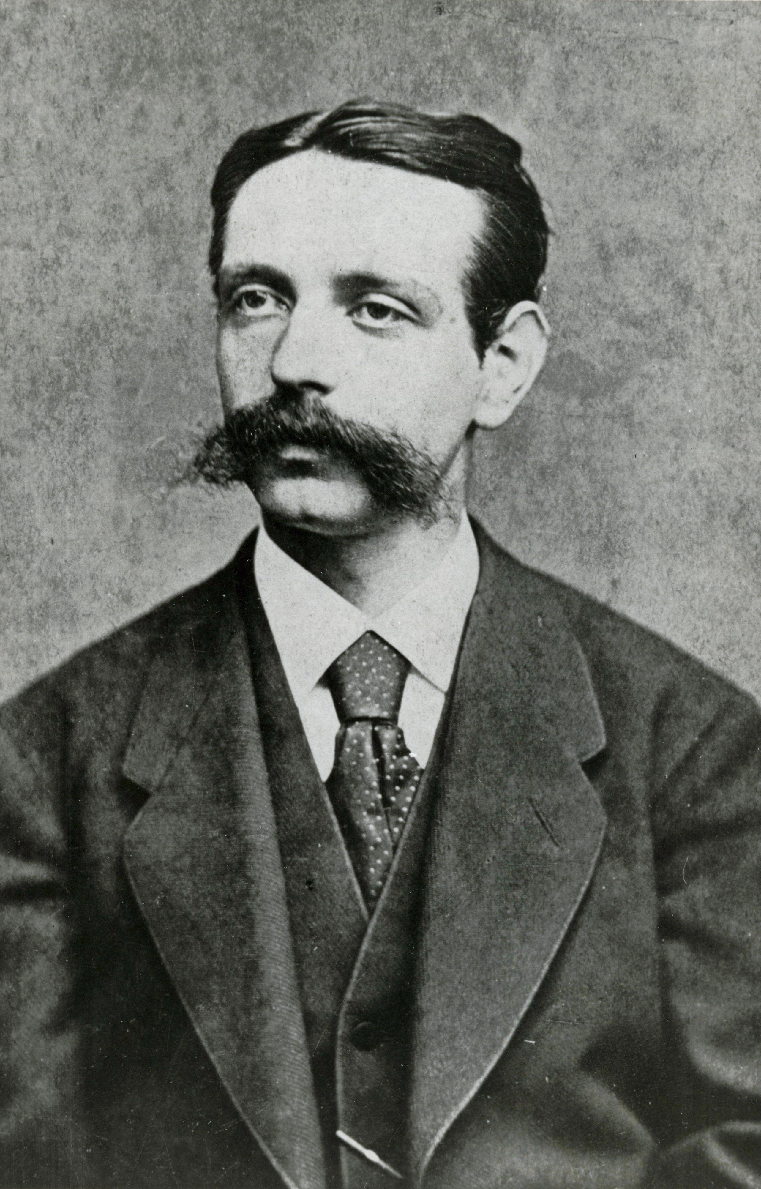 Isaac Anne Lindo